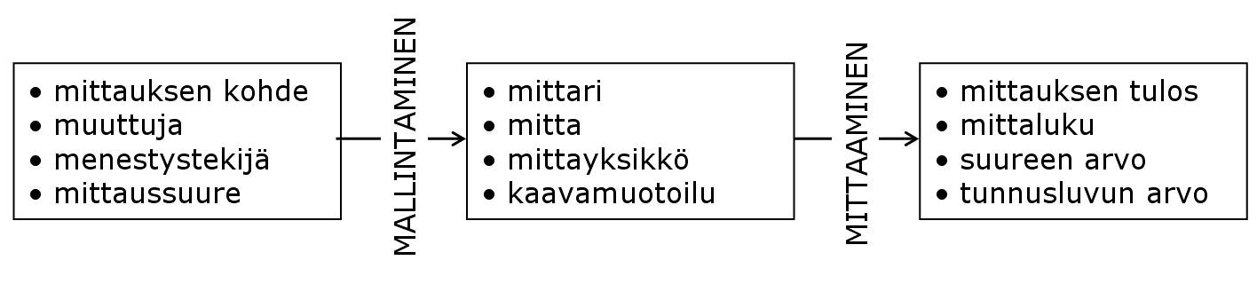 Mittaustermit